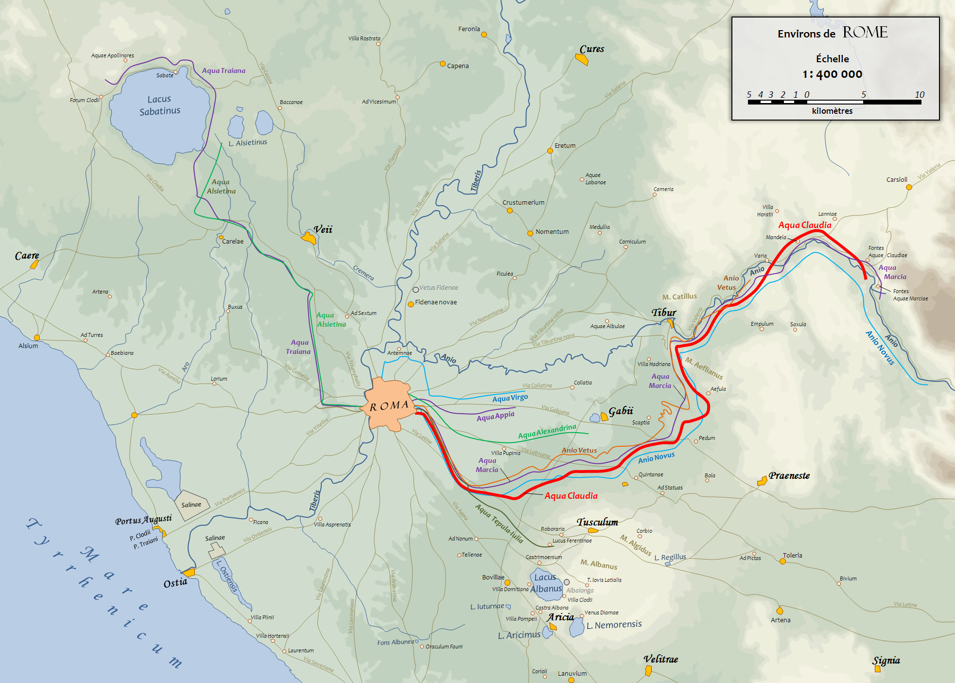 Carte du Latium antique sur lequel figure le tracé des aqueducs de Rome. D'après un fond de carte de 1886 (G. Droysens Allgemeiner Historischer Handatlas).